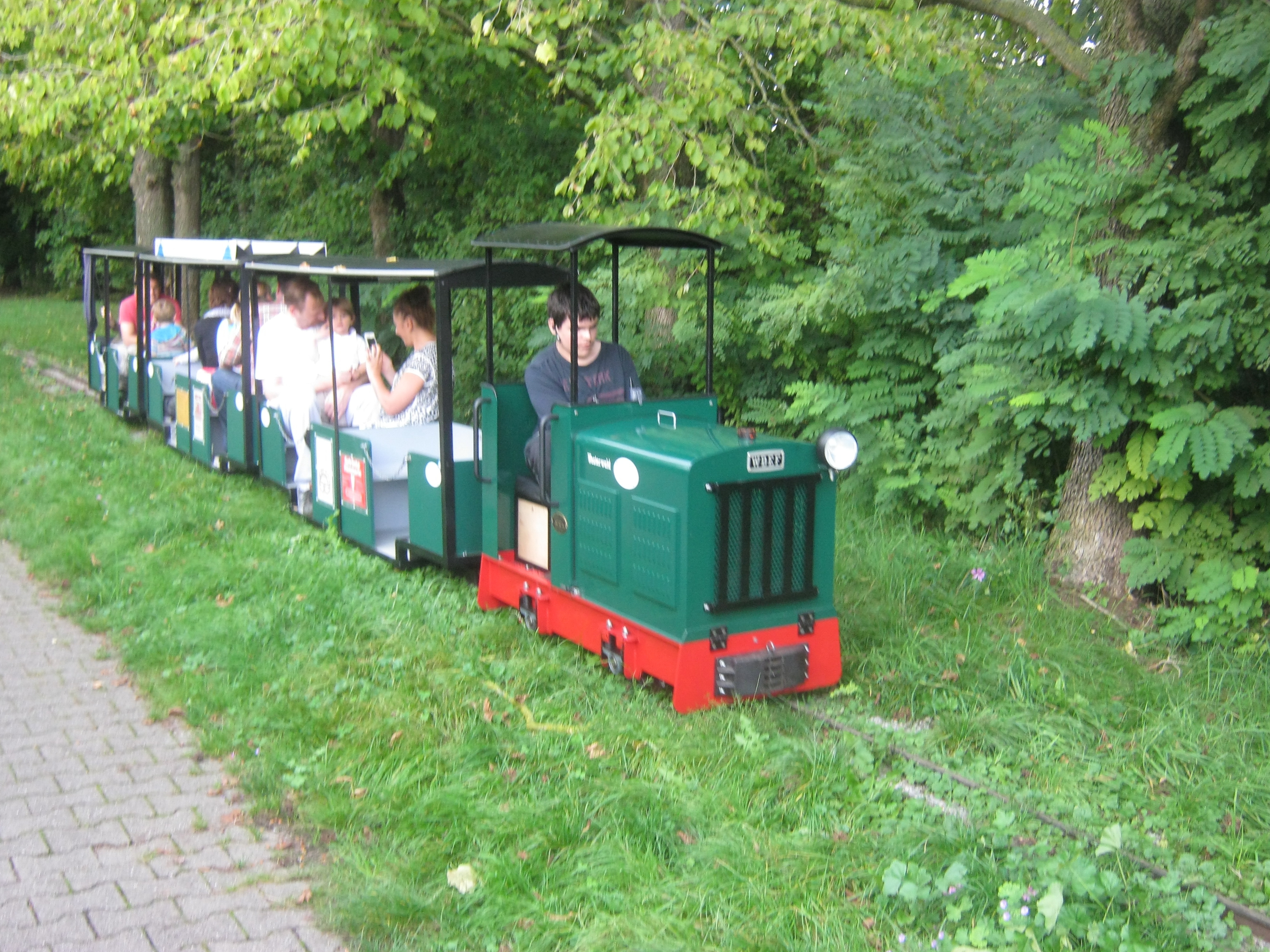 Zug der Parkeisenbahn Fellbach-Schmiden - Google Maps - Google Earth